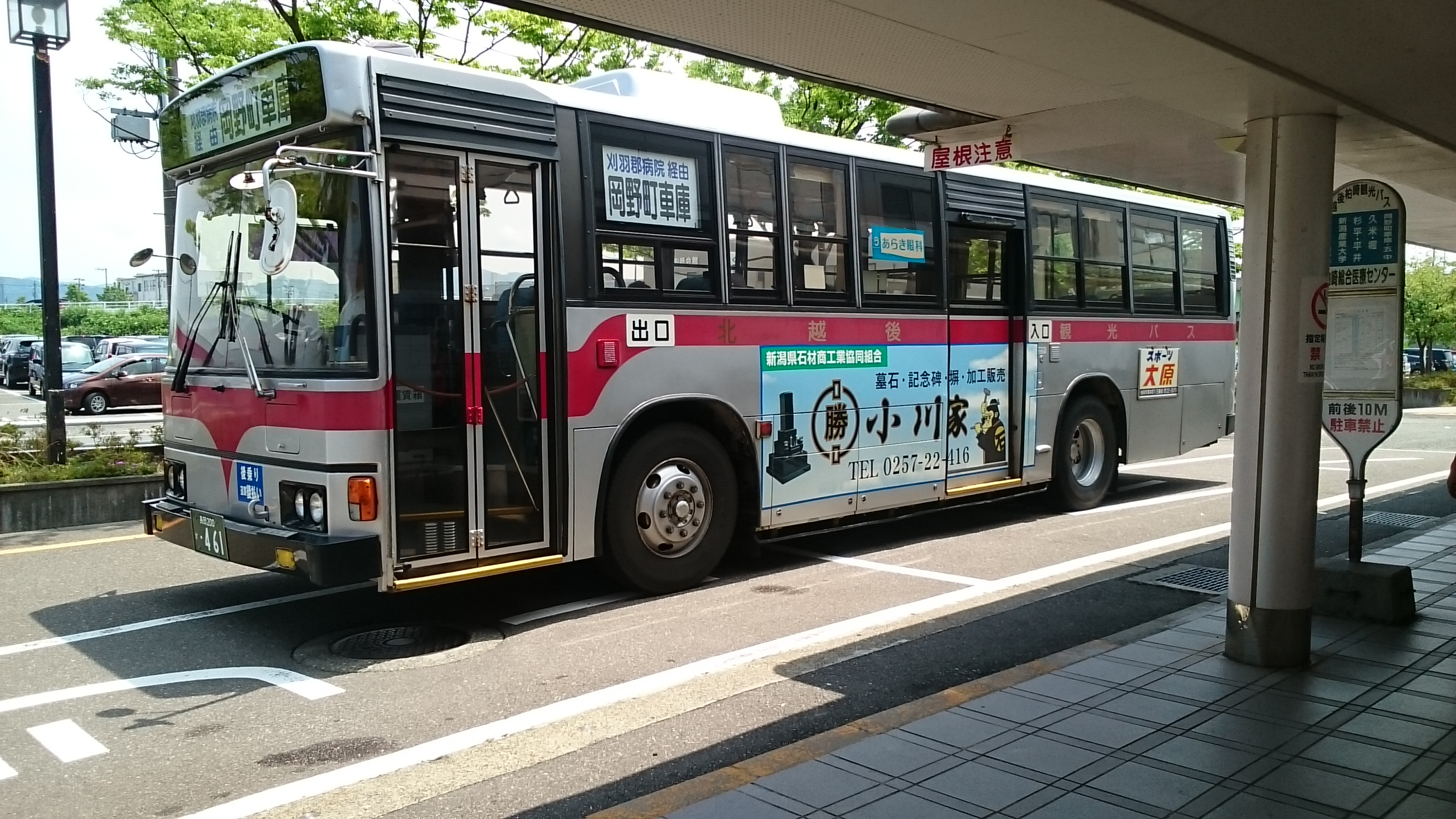 2017/06/28柏崎総合医療センターで投稿者撮影 Category:越後交通の画像